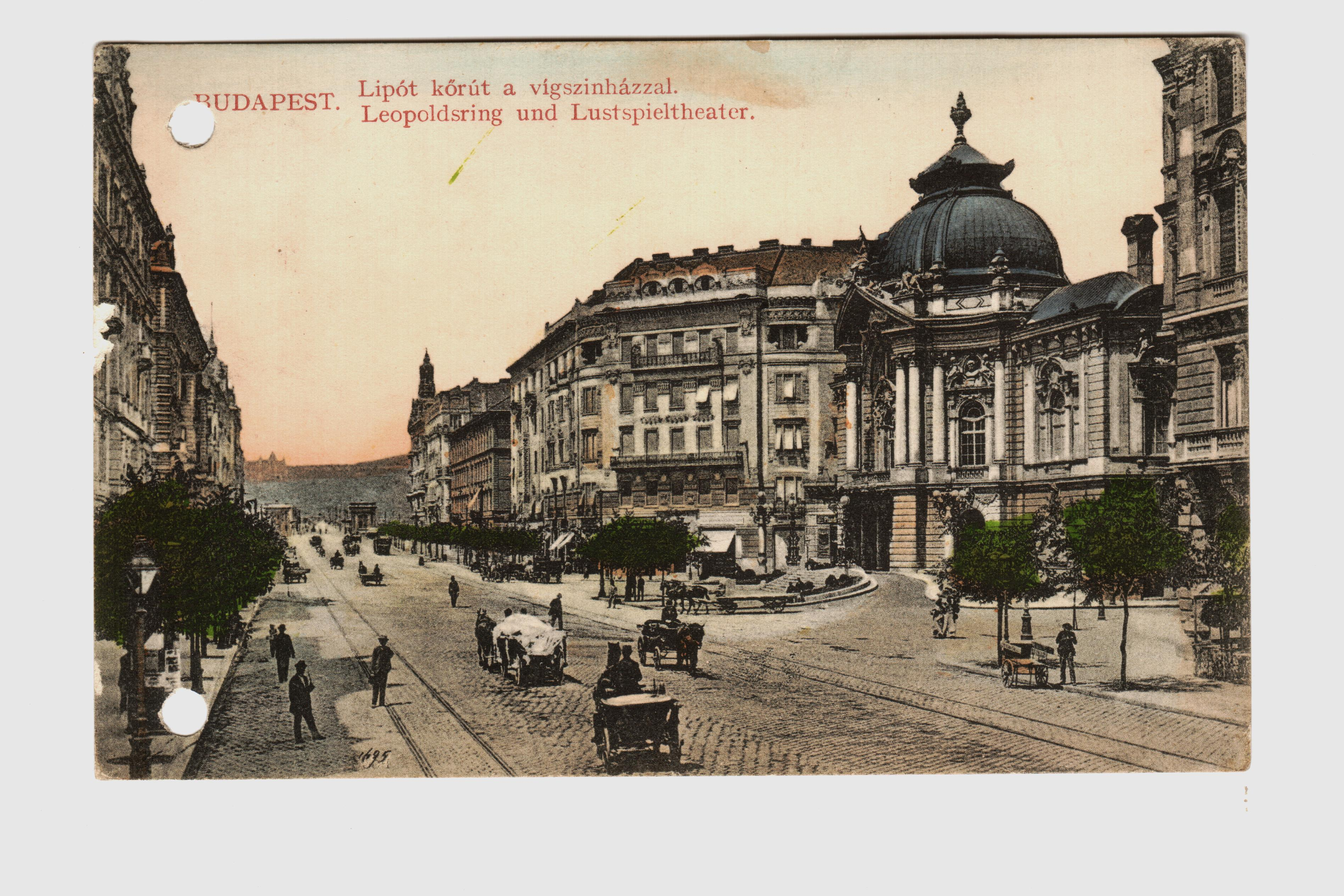 Lipót körút képeslapon, Budapest